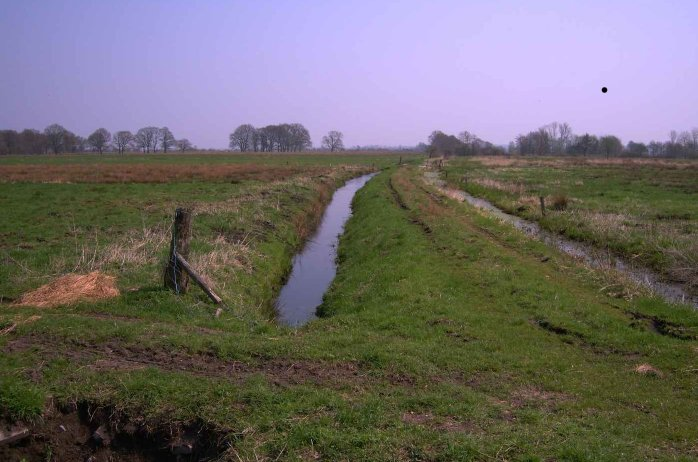 Hammewiesen am Kirchdammgraben in Osterholz. Photographiert im April 2005. Photograph: CWitte